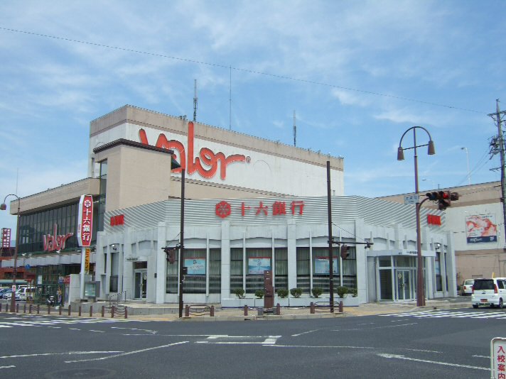 本店であるバロー恵那店と十六銀行恵那支店。岐阜県恵那市 Valor (バロー) and Juroku Bank (十六銀行), in Ena, Gifu, Japan